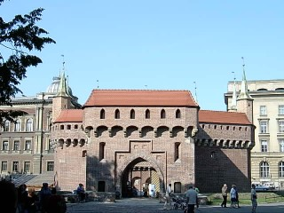 Krakau, Barbakane Hinweis vom Urheber des Fotos: Dieses Foto wurde von mir im Spätsommer 2003 aufgenommen. Das Foto ist im Sinne der GFDL freigegeben. Die Verwendung dieses Fotos ist somit inner- und außerhalb von Wikipedia FREI und ausdrücklich erwünscht. Germania